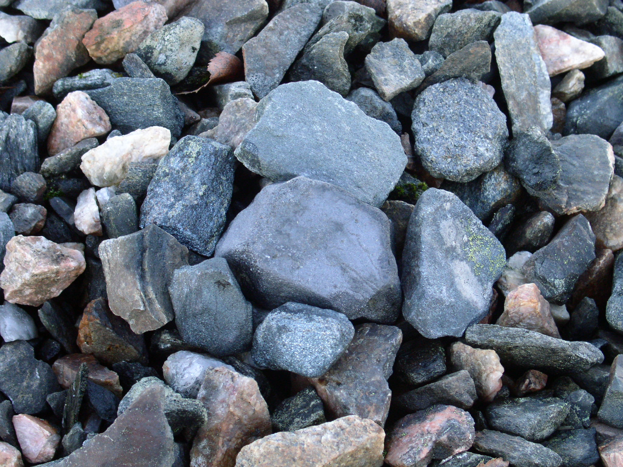 några järnmalmstycken (Magnetit och Hematit) bland "gråberg" vid Grängesbergs gruva, Norra tippen.